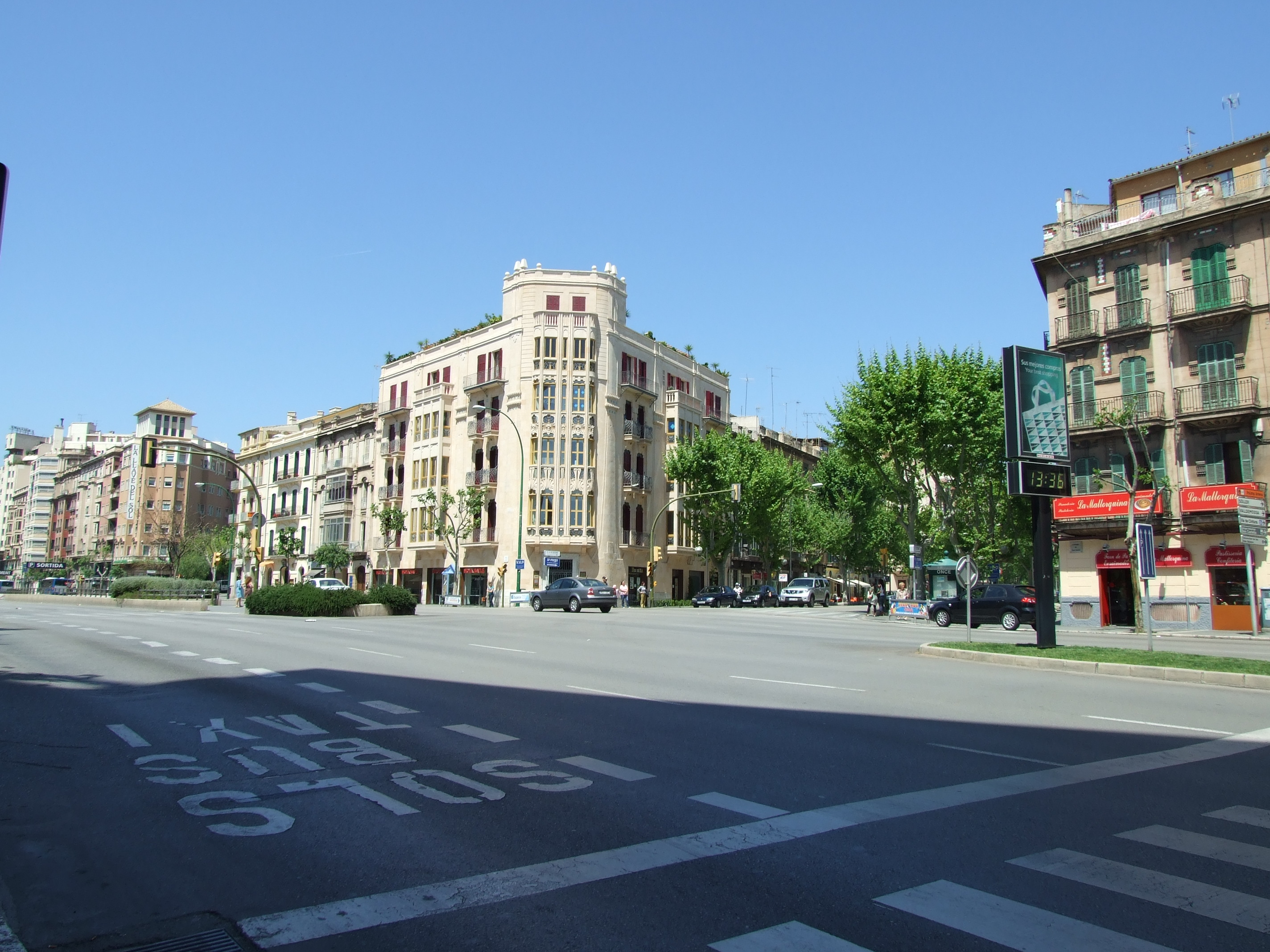 Edificis a la confluència del Carrer 31 de Desembre amb les avingudes a Palma, Mallorca.